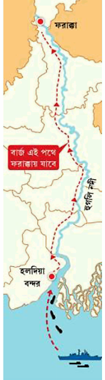 হলদিয়া-ফারাক্কা জলপথ।এটি জাতীয় জলপথ ১ এর অংশ।